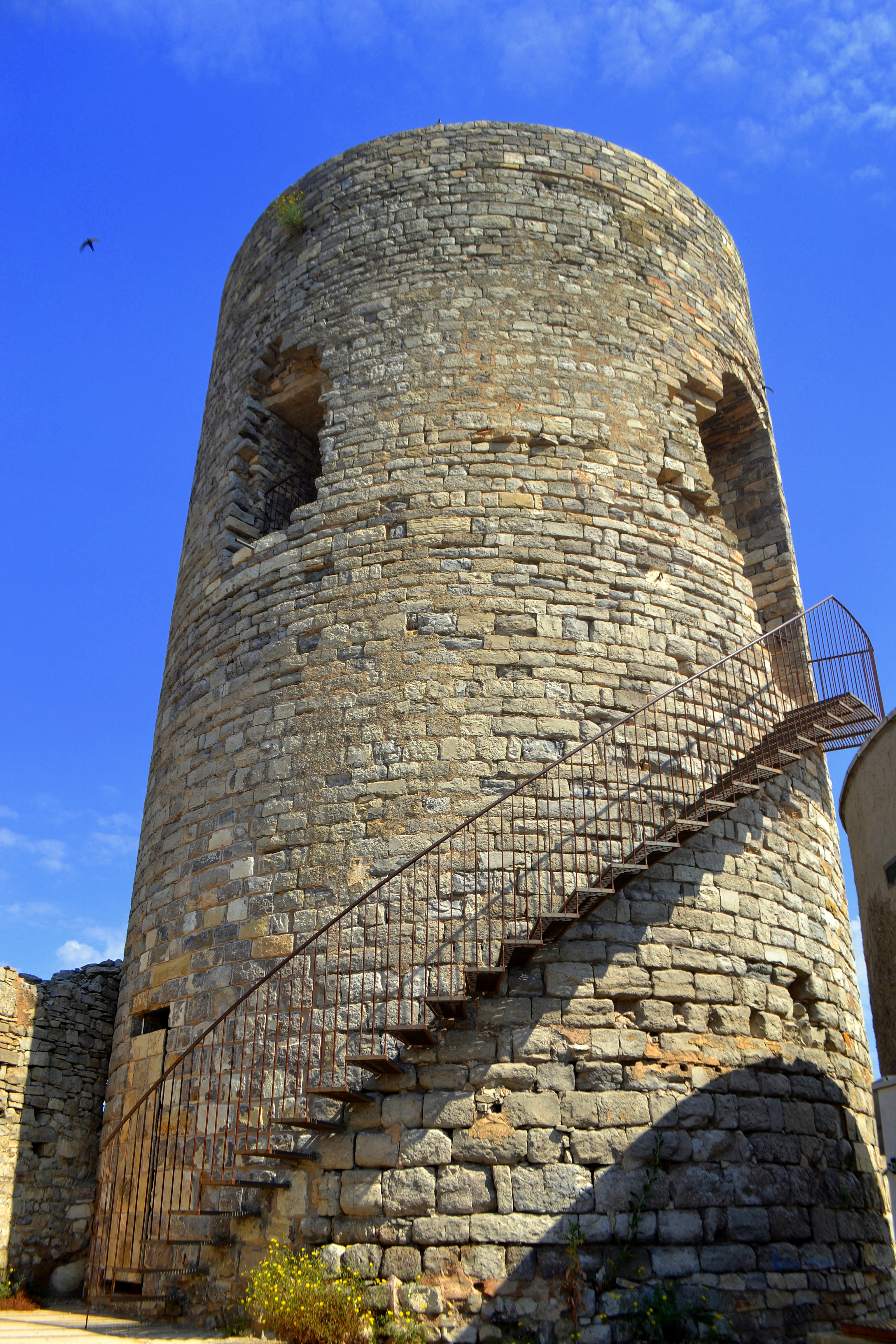 Castell de l'Ametlla de Segarra (Montoliu de Segarra)